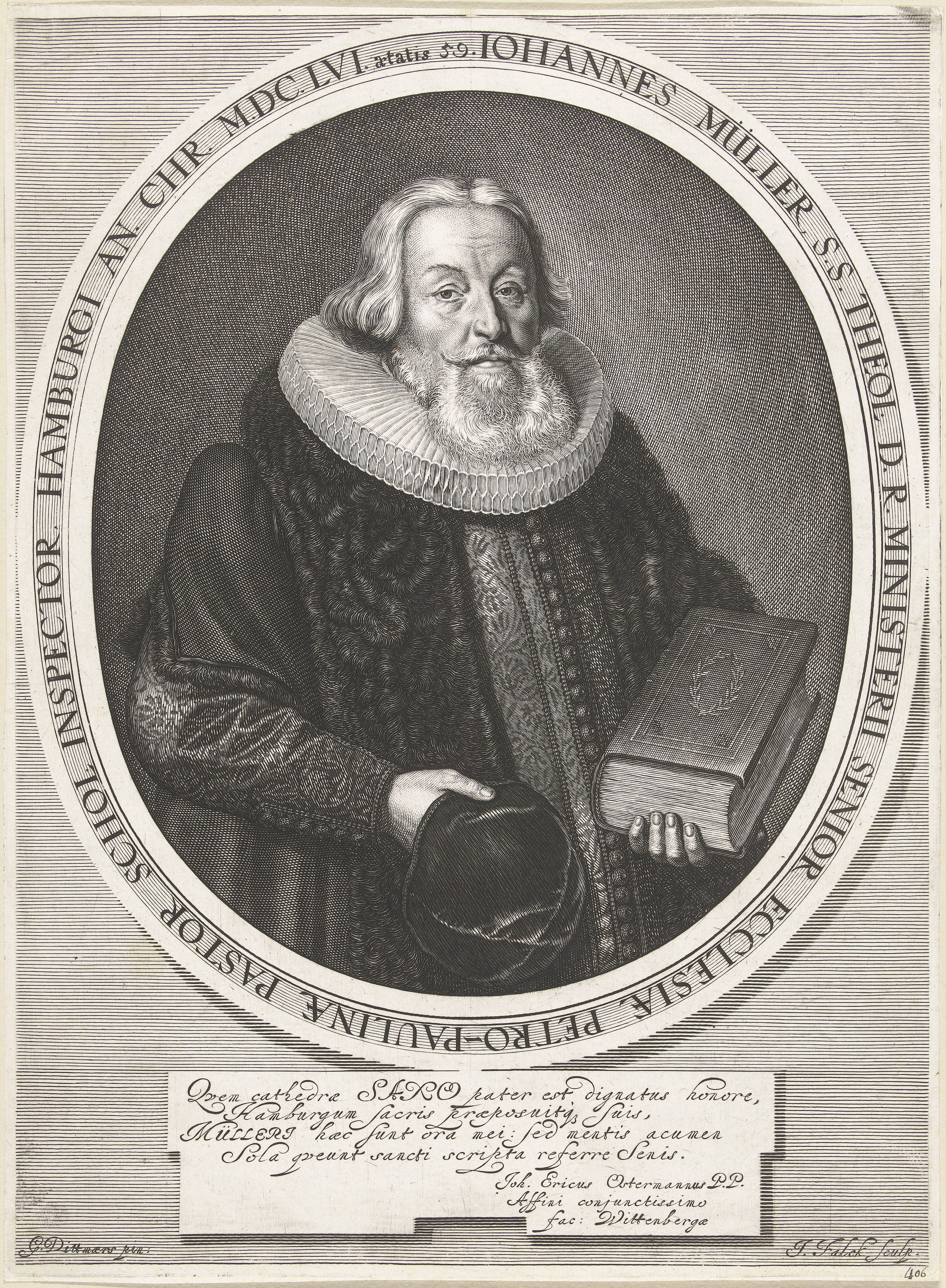 IdentificatieTitel(s): Portret van Johannes MüllerObjecttype: prent Objectnummer: RP-P-OB-50.579Catalogusreferentie: Hollstein Dutch 269Block 269Opschriften / Merken: verzamelaarsmerk, verso, gestempeld: Lugt 240Omschrijving: Portret van de Duitse predikant en theoloog Johannes Müller, ten halven lijve afgebeeld met dik boek in zijn linker en hoofddeksel in zijn rechter hand. In een ovale omlijsting met opschrift en onderschrift in Latijn.VervaardigingVervaardiger: prentmaker: Jeremias Falck (vermeld op object)naar schilderij van: Gerd Dittmers (vermeld op object)Plaats vervaardiging: HamburgDatering: 1657 - 1667Fysieke kenmerken: gravureMateriaal: papier Techniek: graveren (drukprocedé)Afmetingen: blad: h 344 mm × b 254 mmOnderwerpWie: Johannes MullerVerwerving en rechtenVerwerving: overdracht van beheer 1816Copyright: Publiek domein